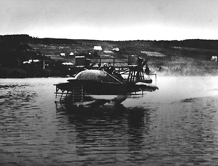 Bell HD-4 Hydrofoil